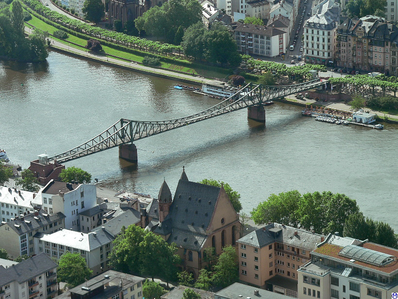 Eiserner Steg Frankfurt am Main, vom Commerzbanktower fotografiert (7.6.2005)